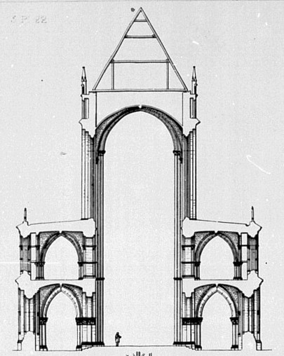 Magdeburger Dom cross section From: Dehio, von Pezold: Die Kirchliche Baukunst des Abendlandes, Stuttgart, 1892-1901, Figure 447